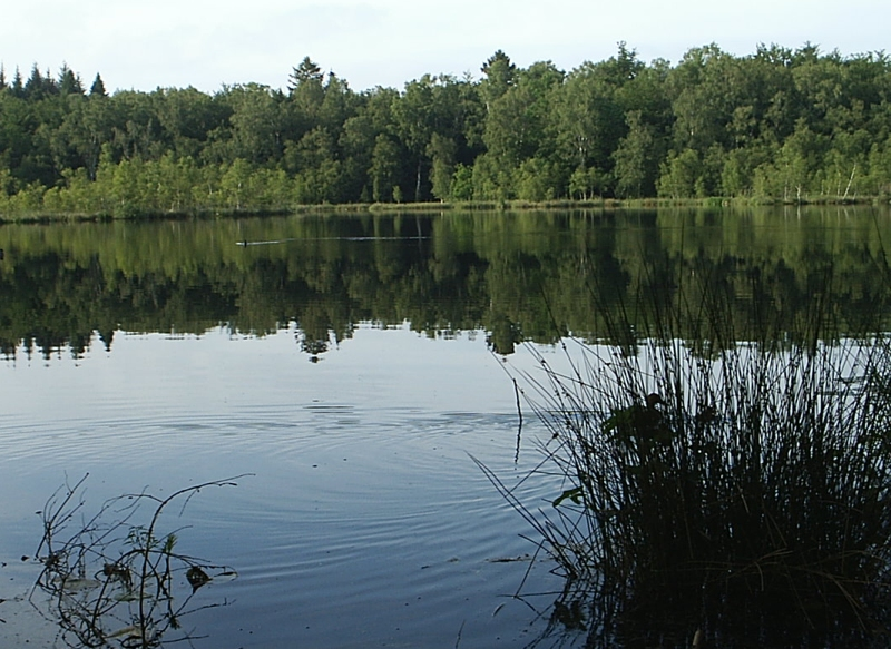 Bøllemosen, nord for København